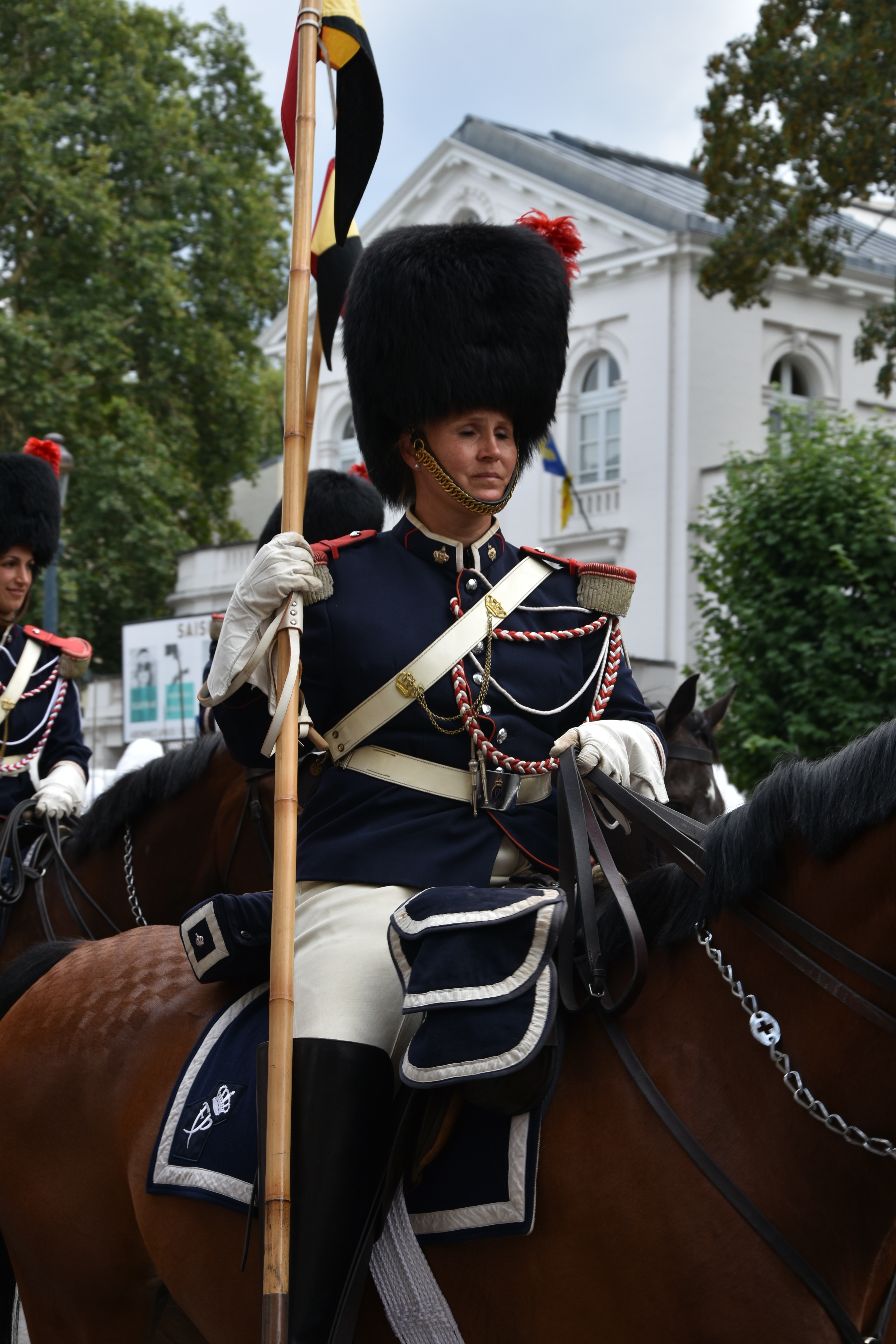 Koninklijke escorte - Nationaal defilé 21-07-2018 15-14-24 This photo of immaterial heritage has been taken in the Brussels Capital Region